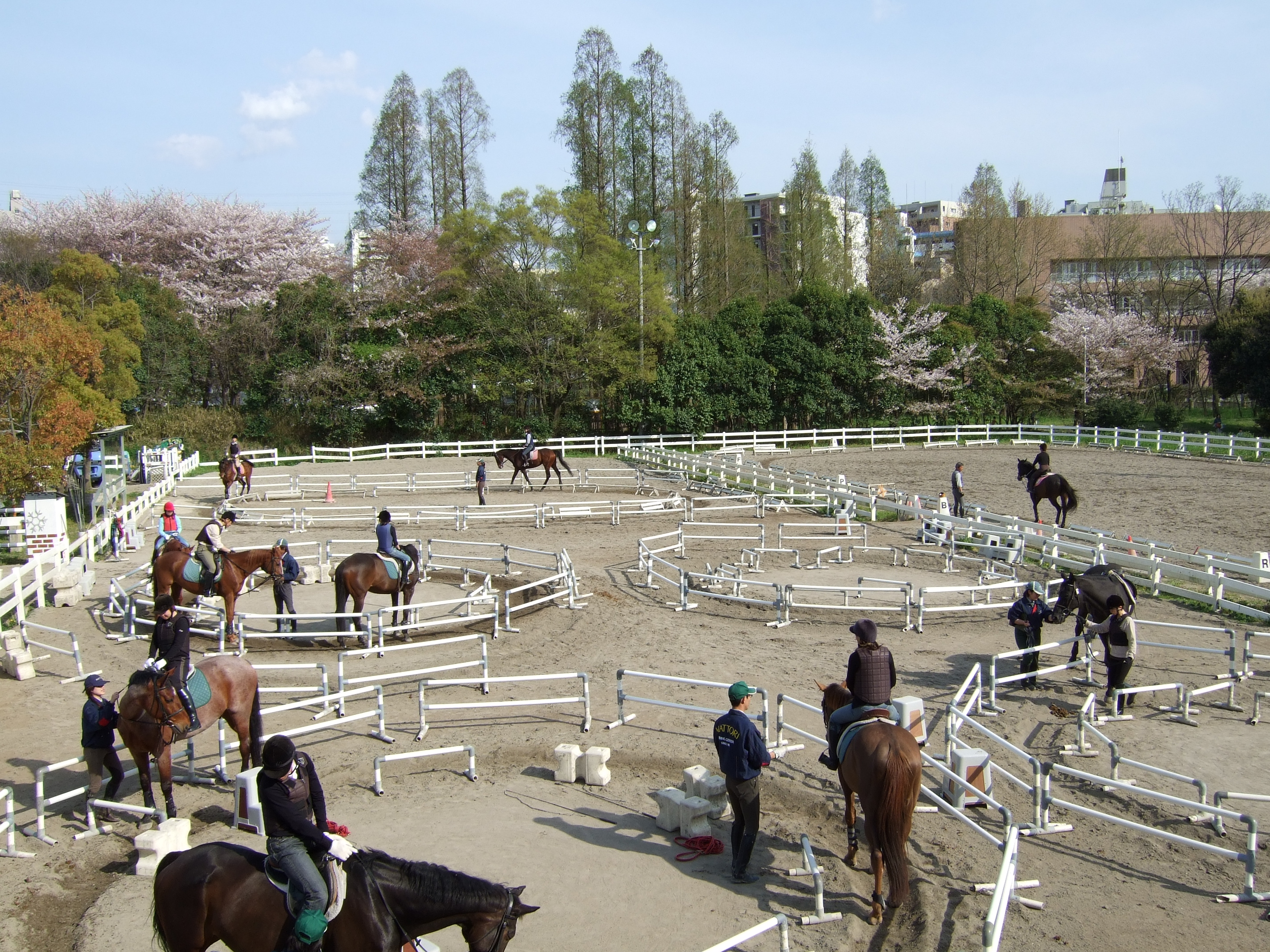 Toyonaka Hattori Ryokuchi